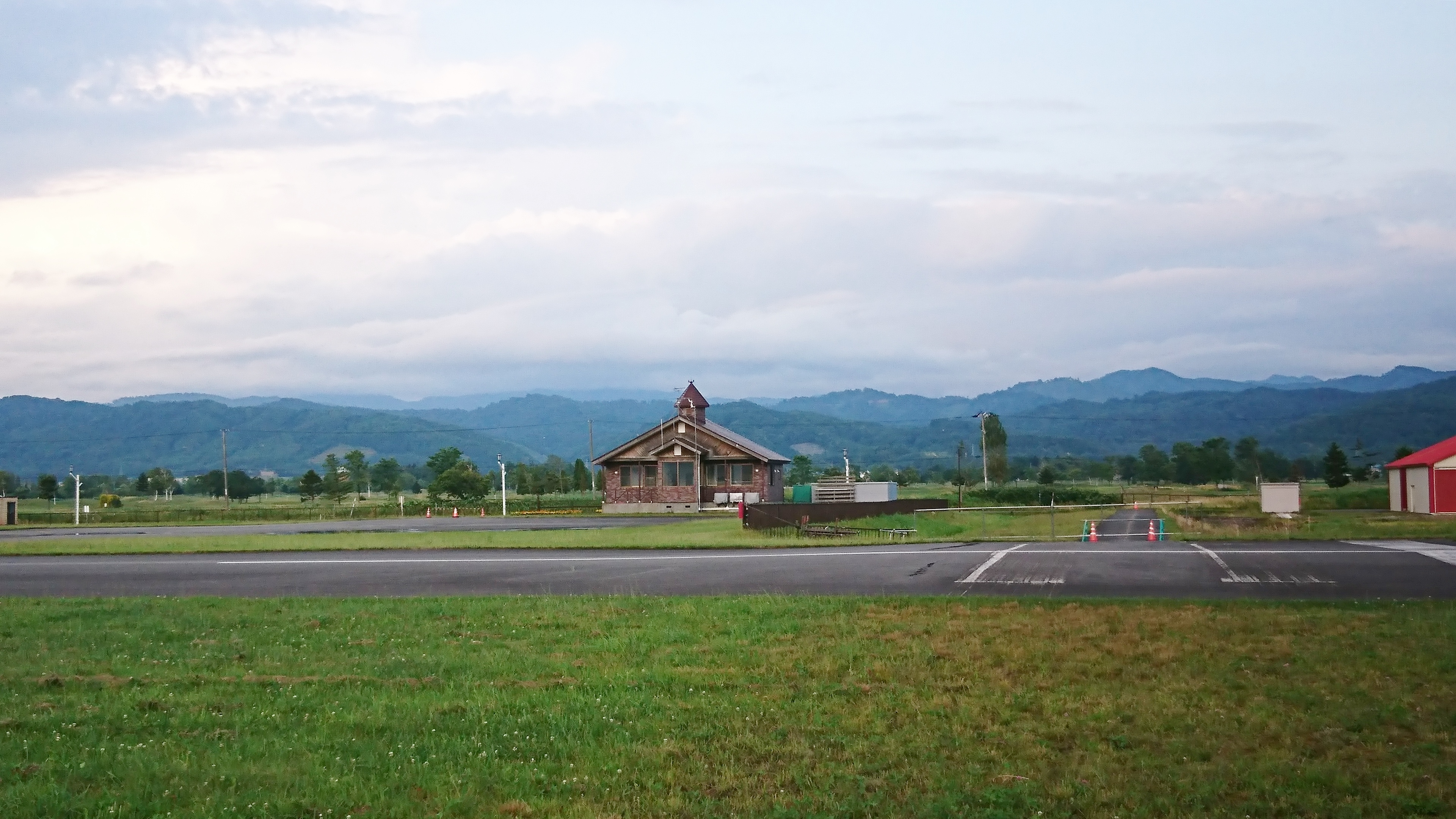 スカイポート美唄 管理区域側